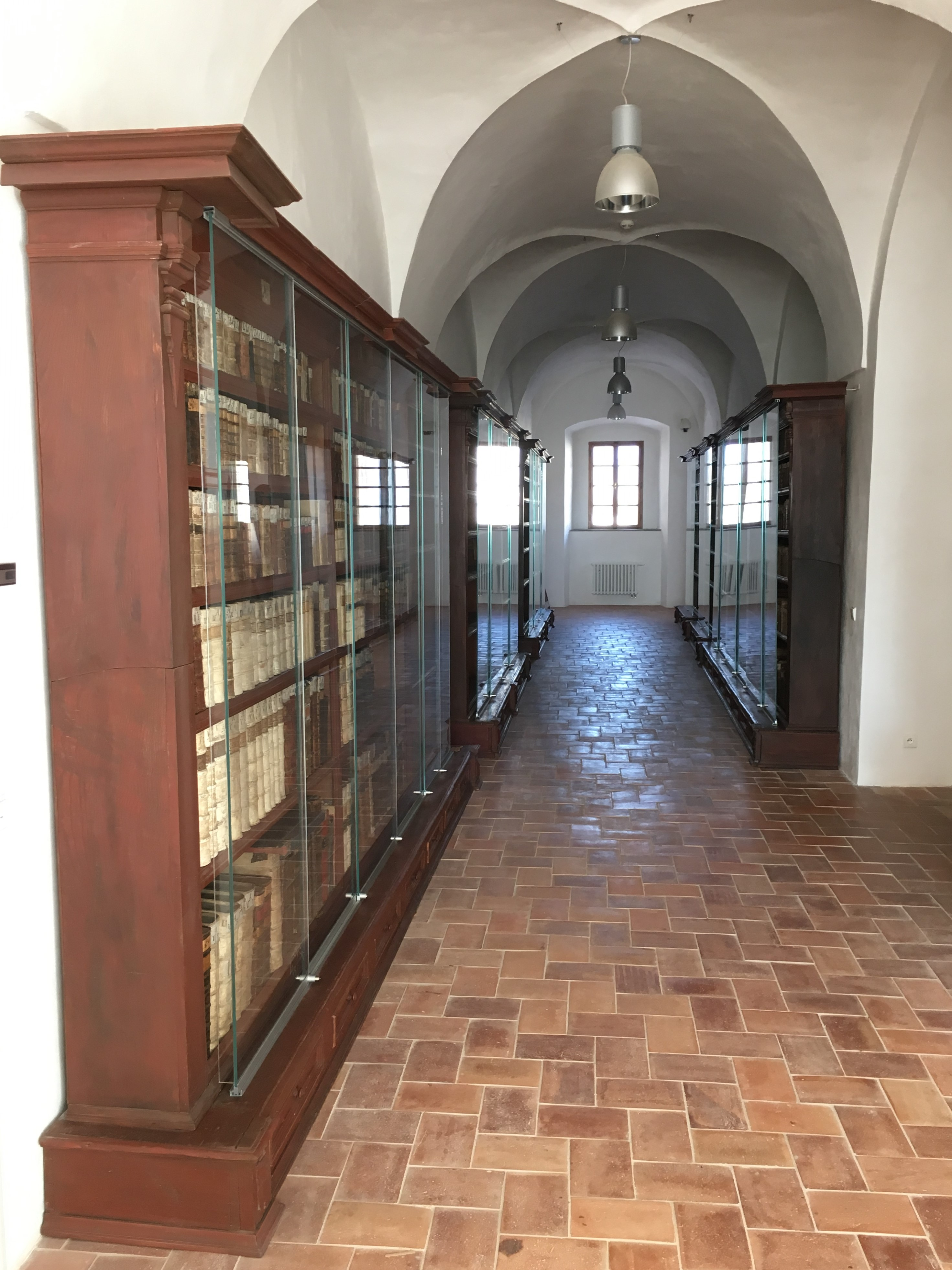 Spojovací chodba piaristické koleje v Litomyšli